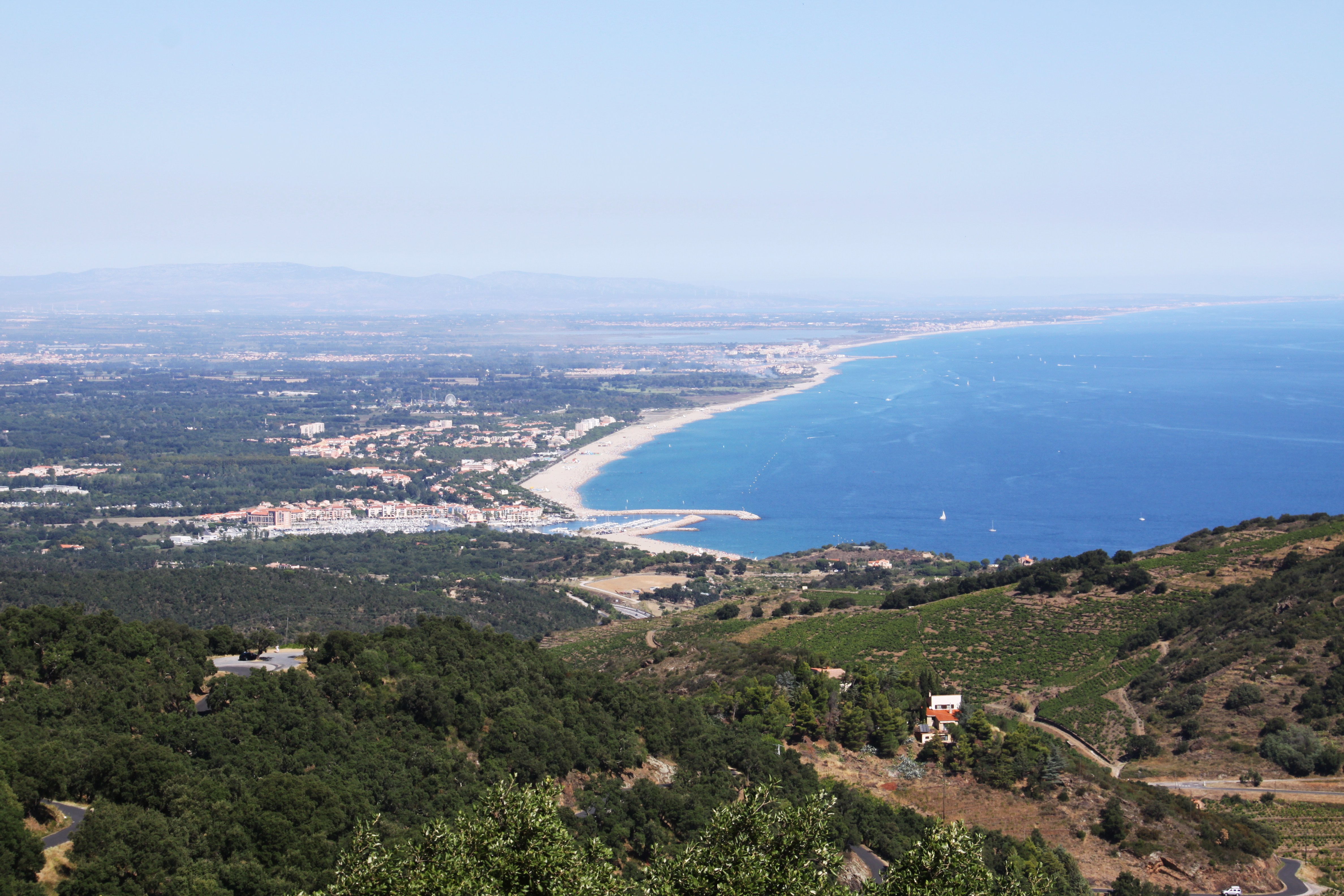 Vue depuis l' une des tables d 'orientation situées sur la route D 86 (menant à la Tour de Madeloc) de Port-Argelès, d' Argelès-Plage (Plage des Pins) et au loin de St-Cyprien. Table d' orientation de la route départementale D 86 (près du Mas de la Serra et de Collioure), Pyrénées-Orientales, France.